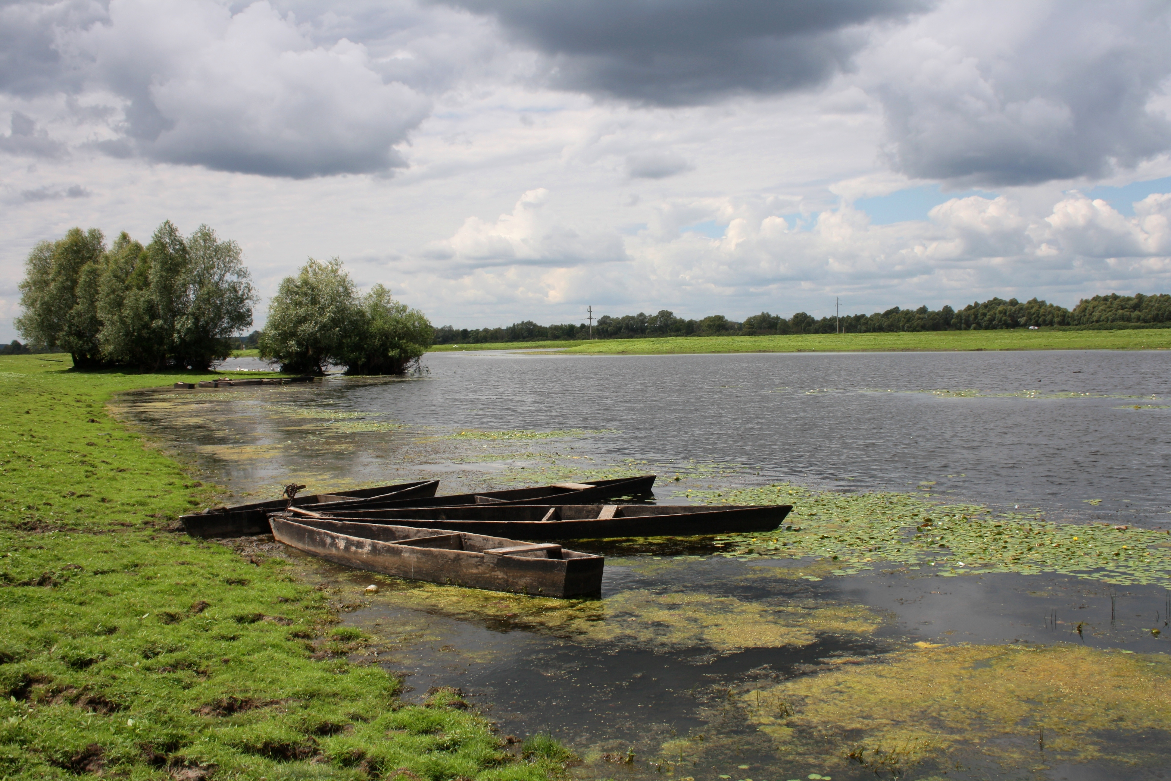 «Деснянсько-Старогутський», Середино-Будський р-н: Зноб-Трубчевська, Старогутська, Стягайлівська, Очкинська, Нововасилівська, Кривоносівська, Кренидівська с/р; ДП «С.-Будський агролісгосп»: кв. 1-10, 12-14, 18, 20, 21 (вид. 1-11, 17), 22, 23 (вид. 1-12, 19), 51, 52 (вид. 10-46), 53, 76-77, 78 (вид. 1-27), 80 (вид. 1-22), 81 (вид. 23), 29, 31 (вид. 1-13, 17-41)